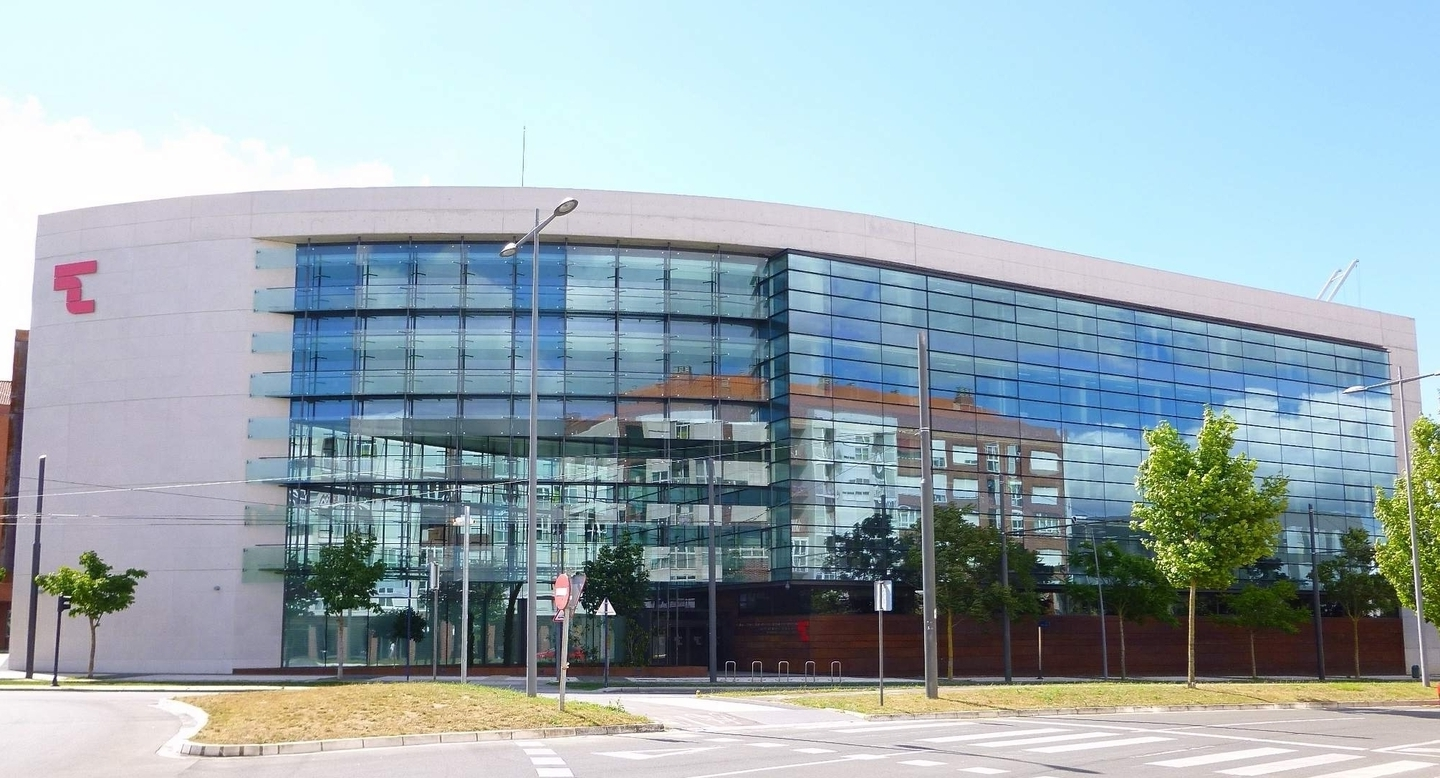 TESORERIA GENERAL DE LA SEGURIDAD SOCIAL EN VICTORIA